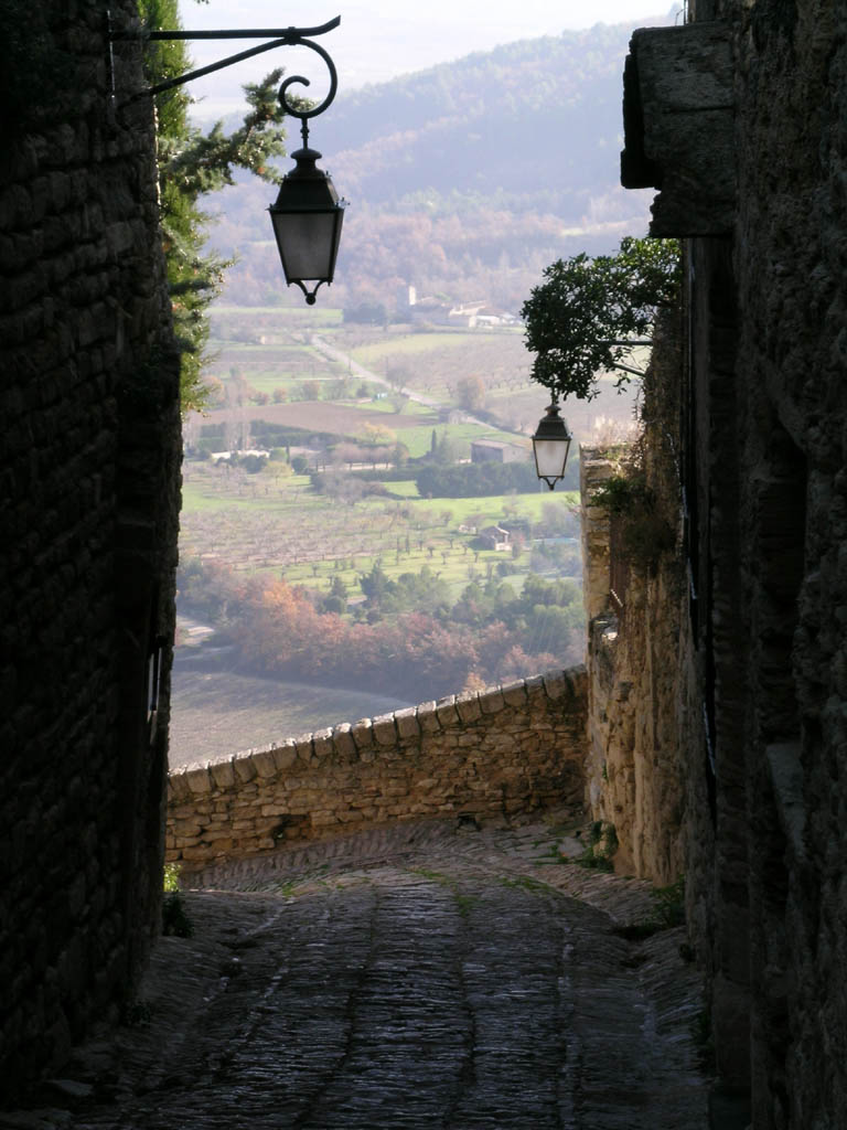 les rues caladés de Gordes France